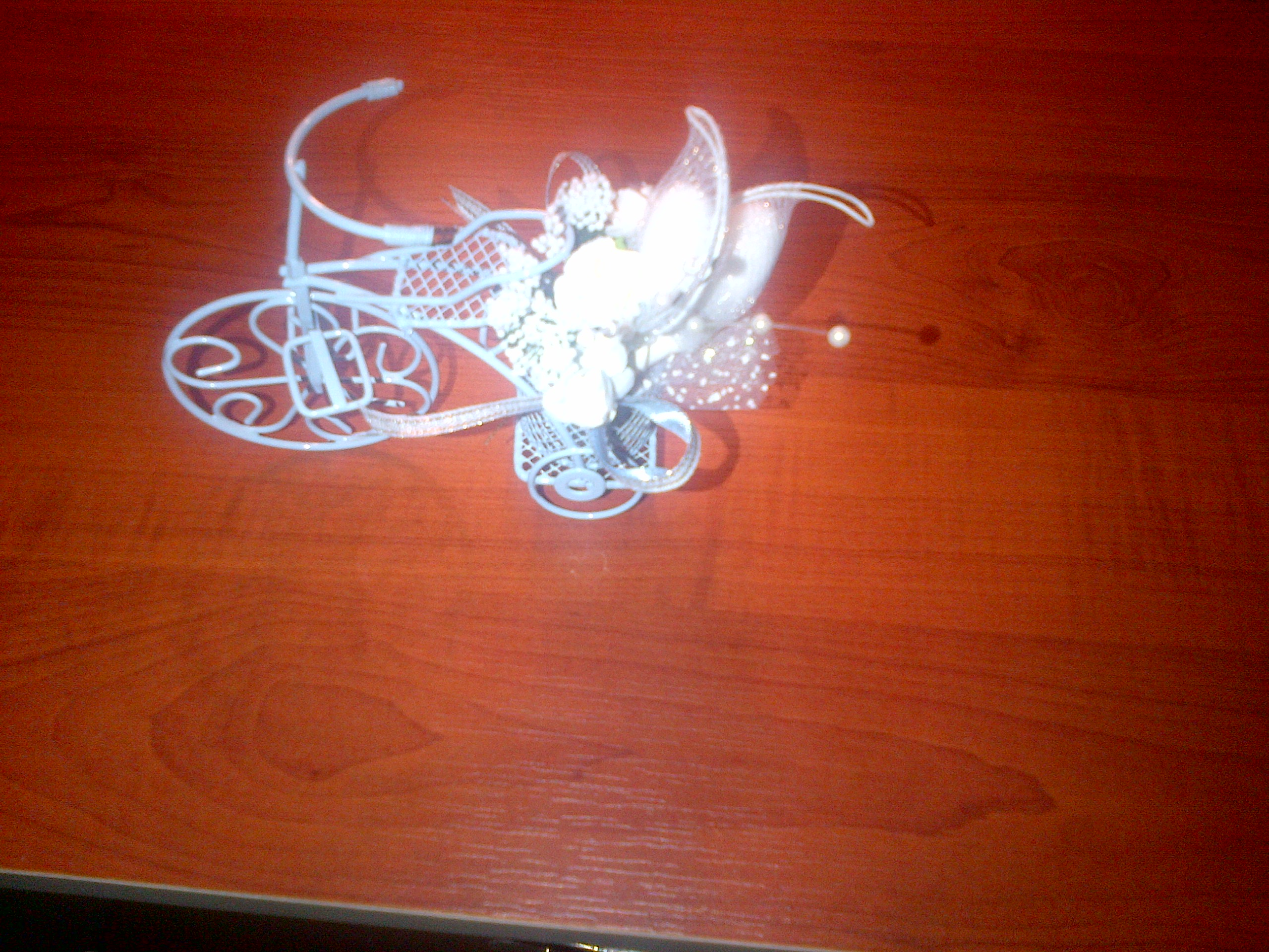 "Gelin şekeri", "nikah şekeri" o düğün şekeri" es una tradicion turca de regalar a los invitados una bolsita de "badem şekeri" con algun monito en las bodas. En la imagen, el monito es un triciclo de alambre.